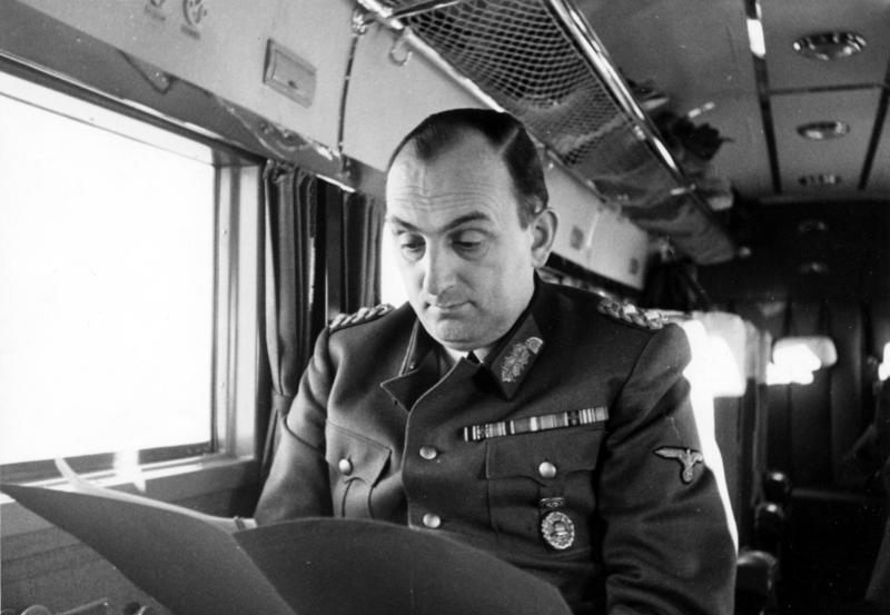 General Daluege während des Ju 52-Fluges nach Wien, 27.11.40